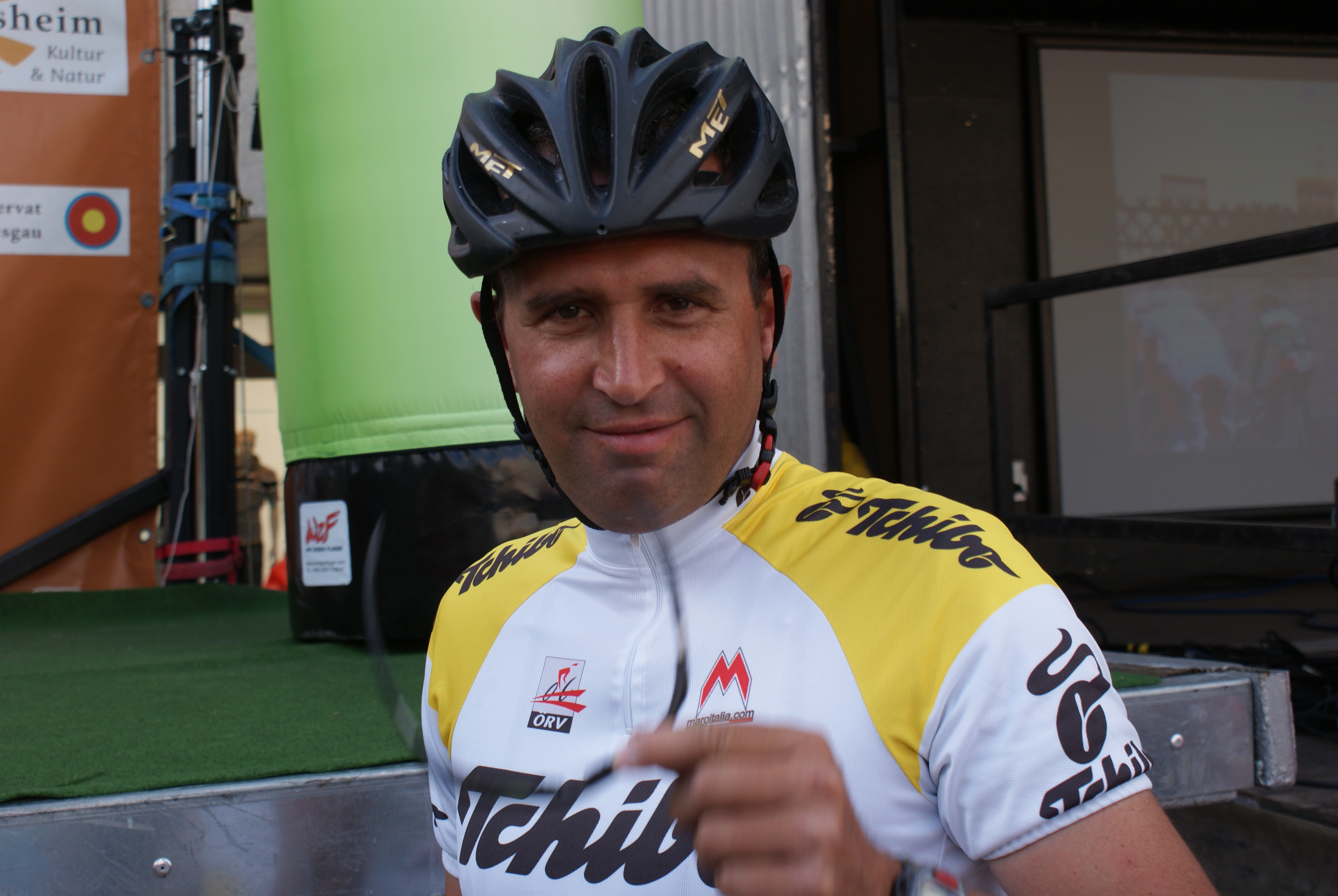 Jure Pavlic Österr. Junioren Nationaltrainer